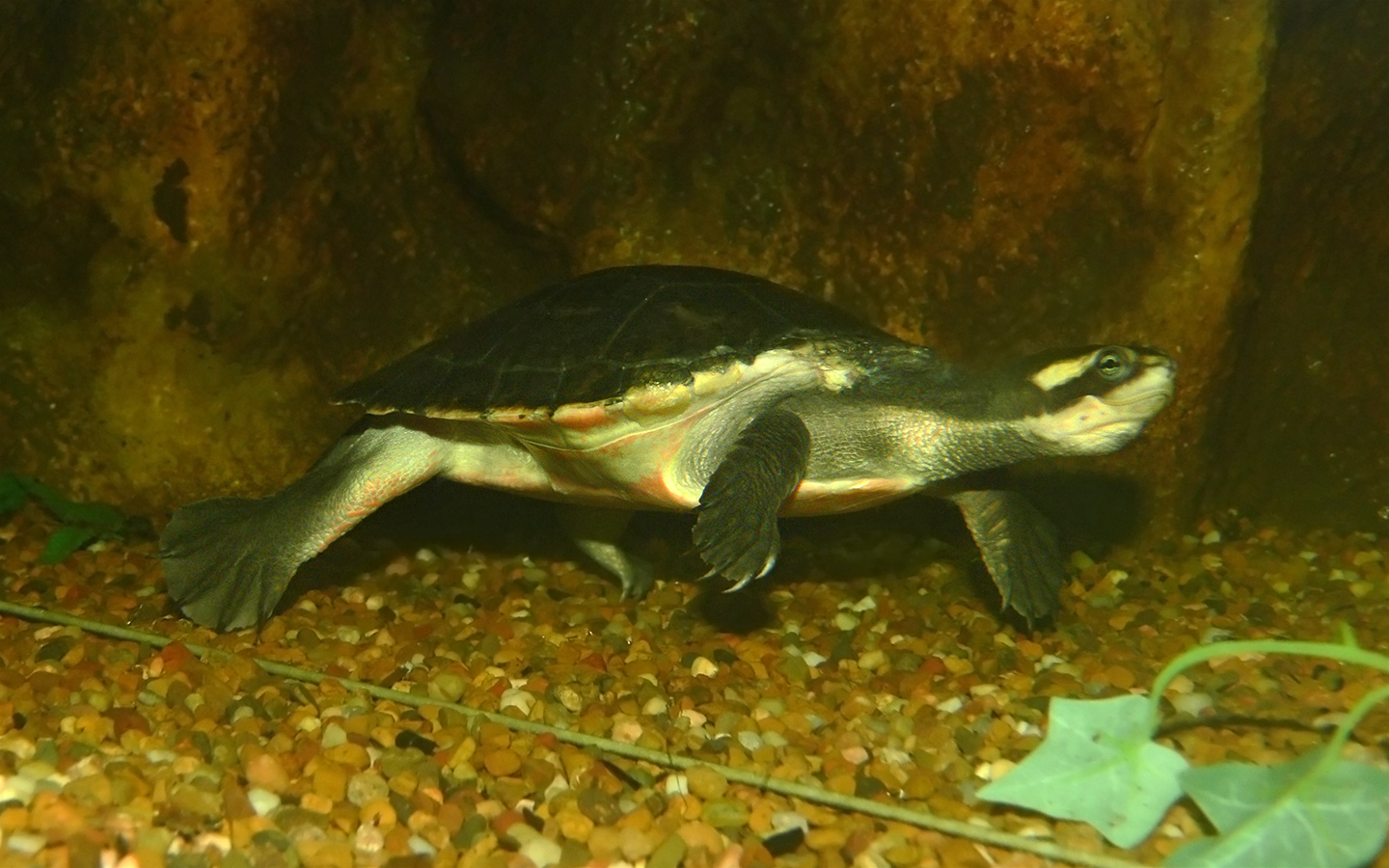 Pink-bellied Sideneck Turtle